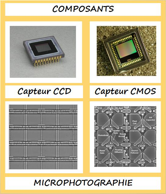 image couplées de capteurs CCD et CMOS